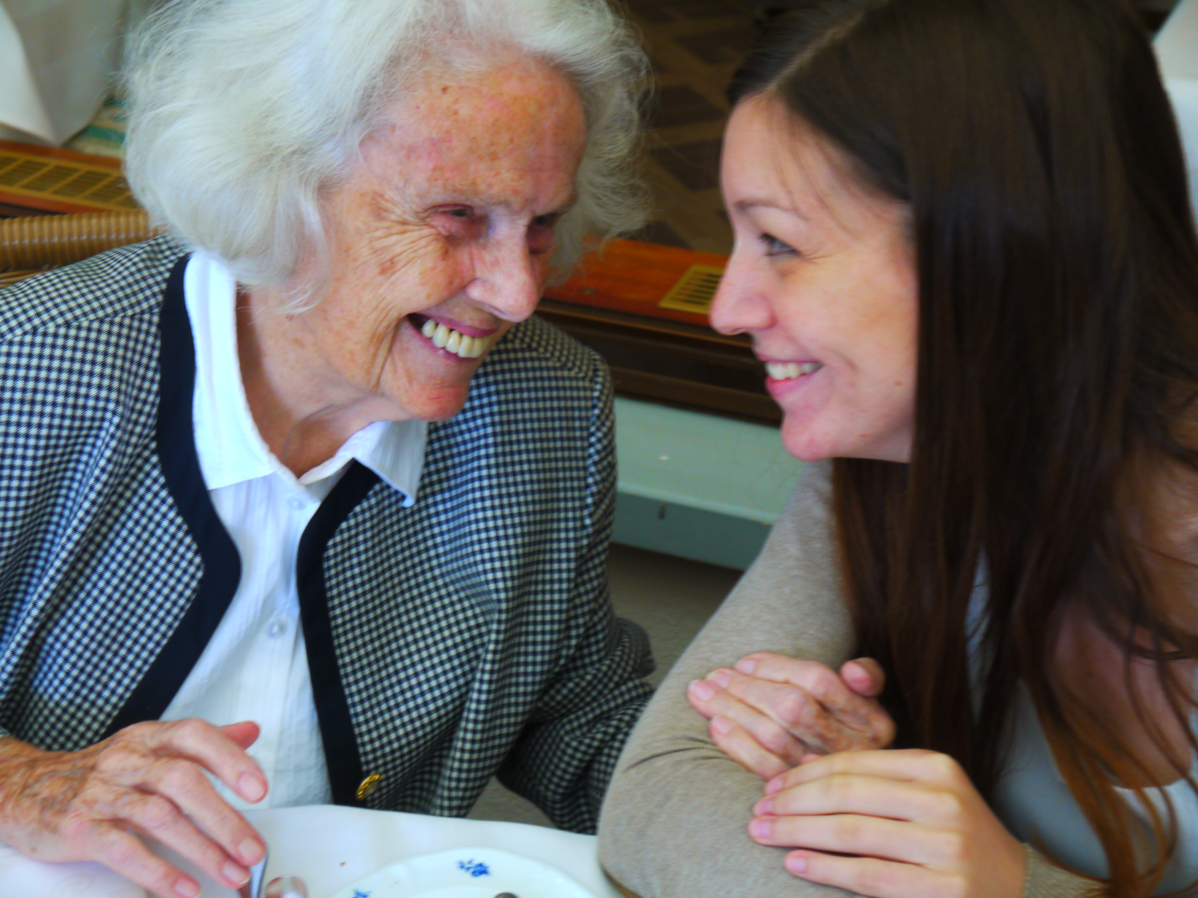 Ekaterina Litvintseva mit Elisabeth Furtwängler im Jahr 2012 in Clarens